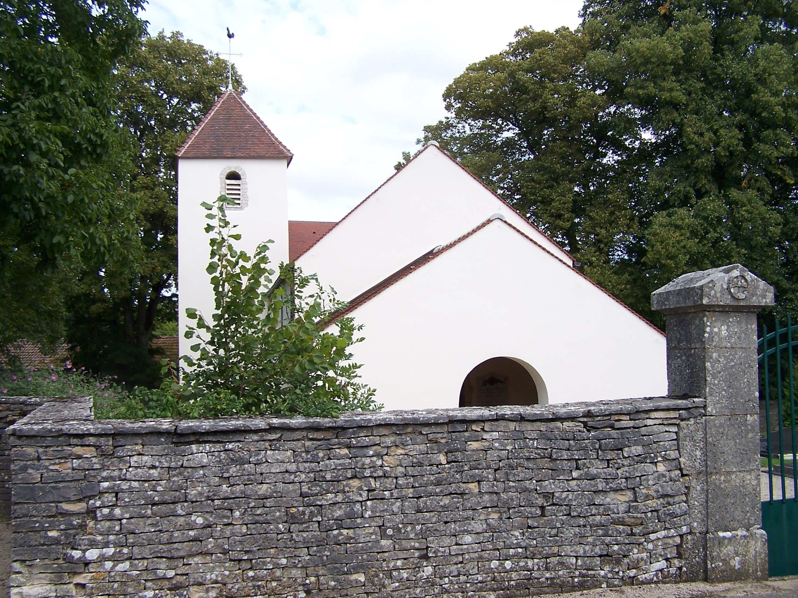 EGLISE DE DAROIS 21